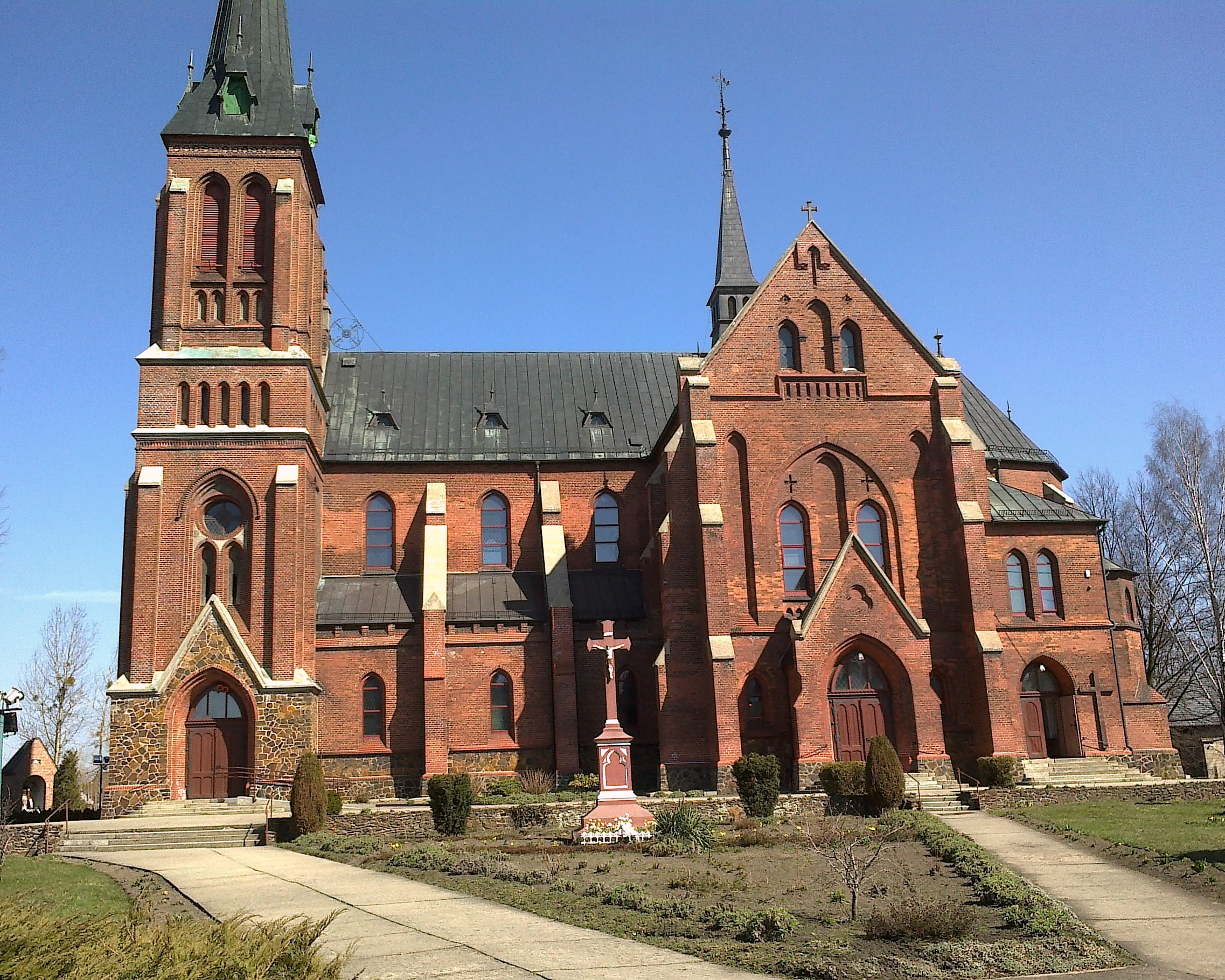 Gorzów Śląski Polska kościół św.Trójcy